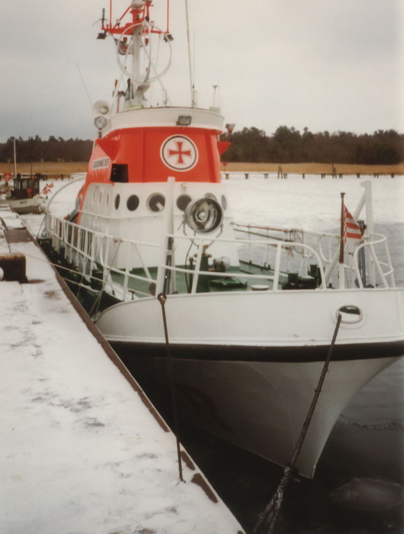 SRK Günther Kuchenbecker am Liegeplart Darsser Ort